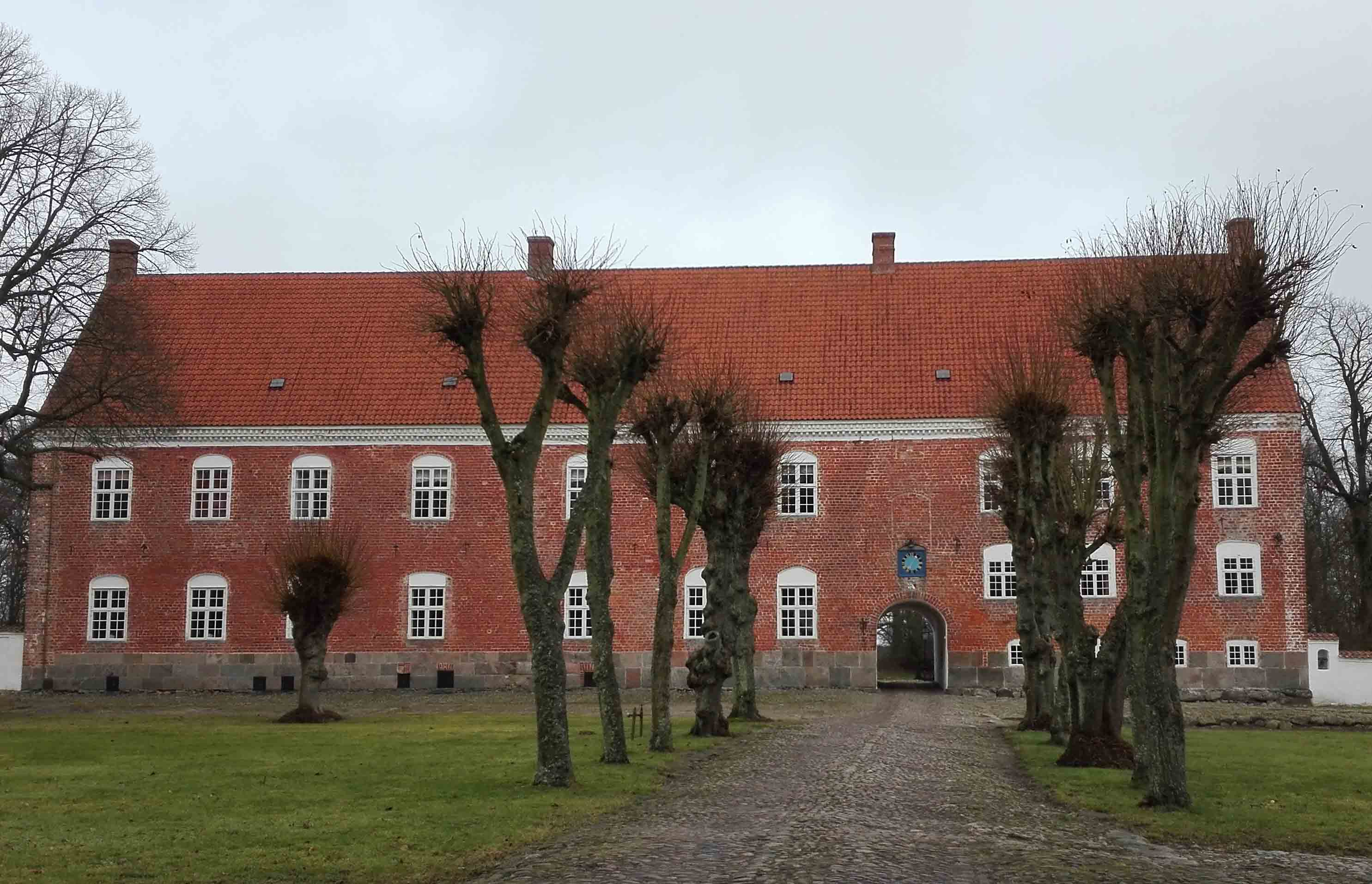 Trudsholms hovedbygning